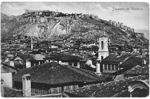 Kütahya 1915.